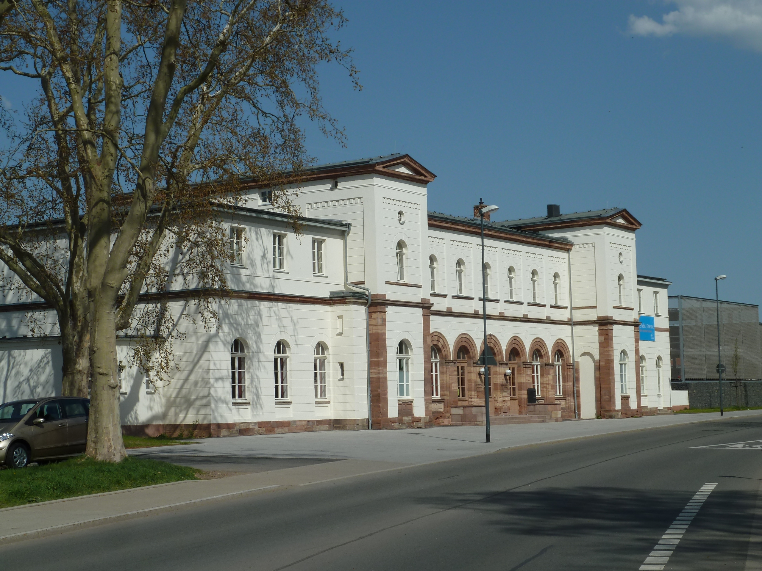 Alter Bahnhof in Eschwege, KulturdenkmalUnknown